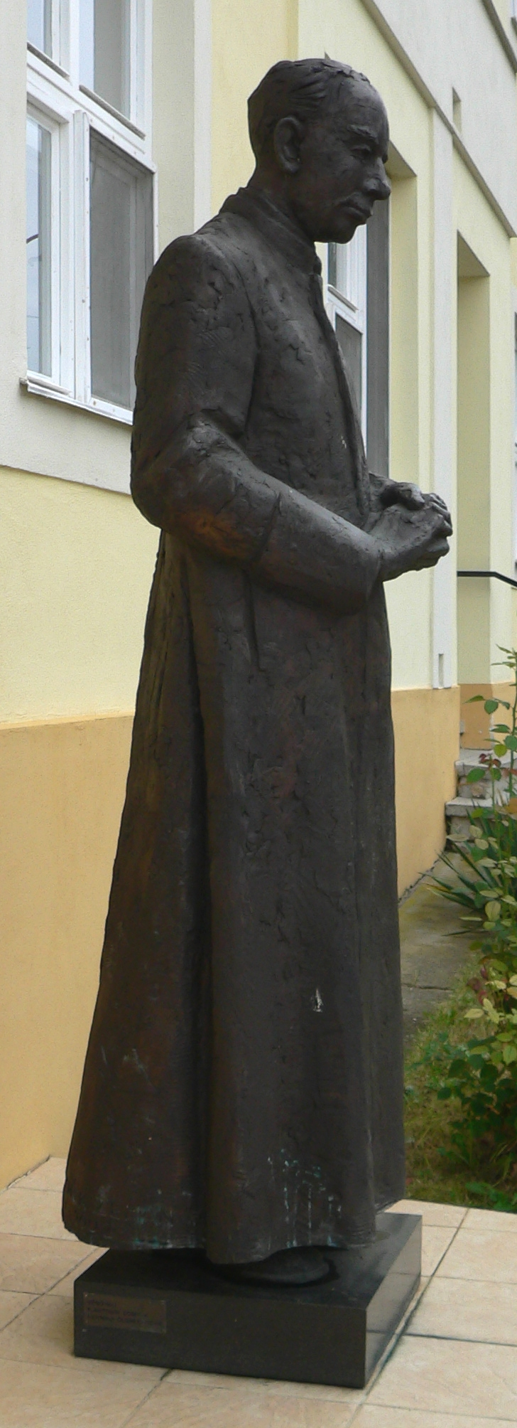 Socha kněze Antonína Šuránka před Pastoračním centrem v Ostrožské Lhotě, celkový pohled. Akademický sochař Bořek Zeman z Uherského Hradiště, bronz, výška 200 cm, rok 2002.